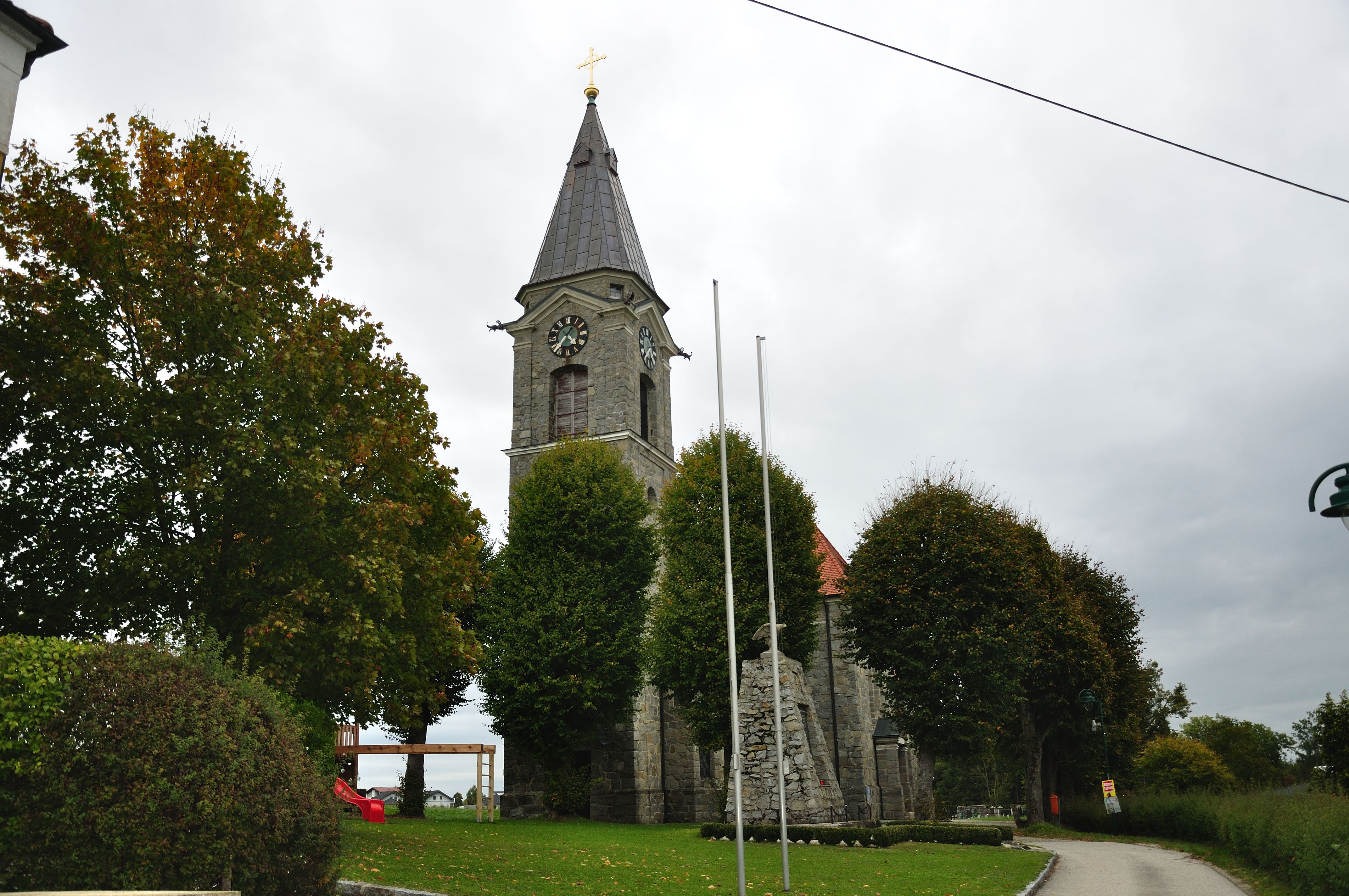 Kath. Pfarrkirche Mariä Himmelfahrt